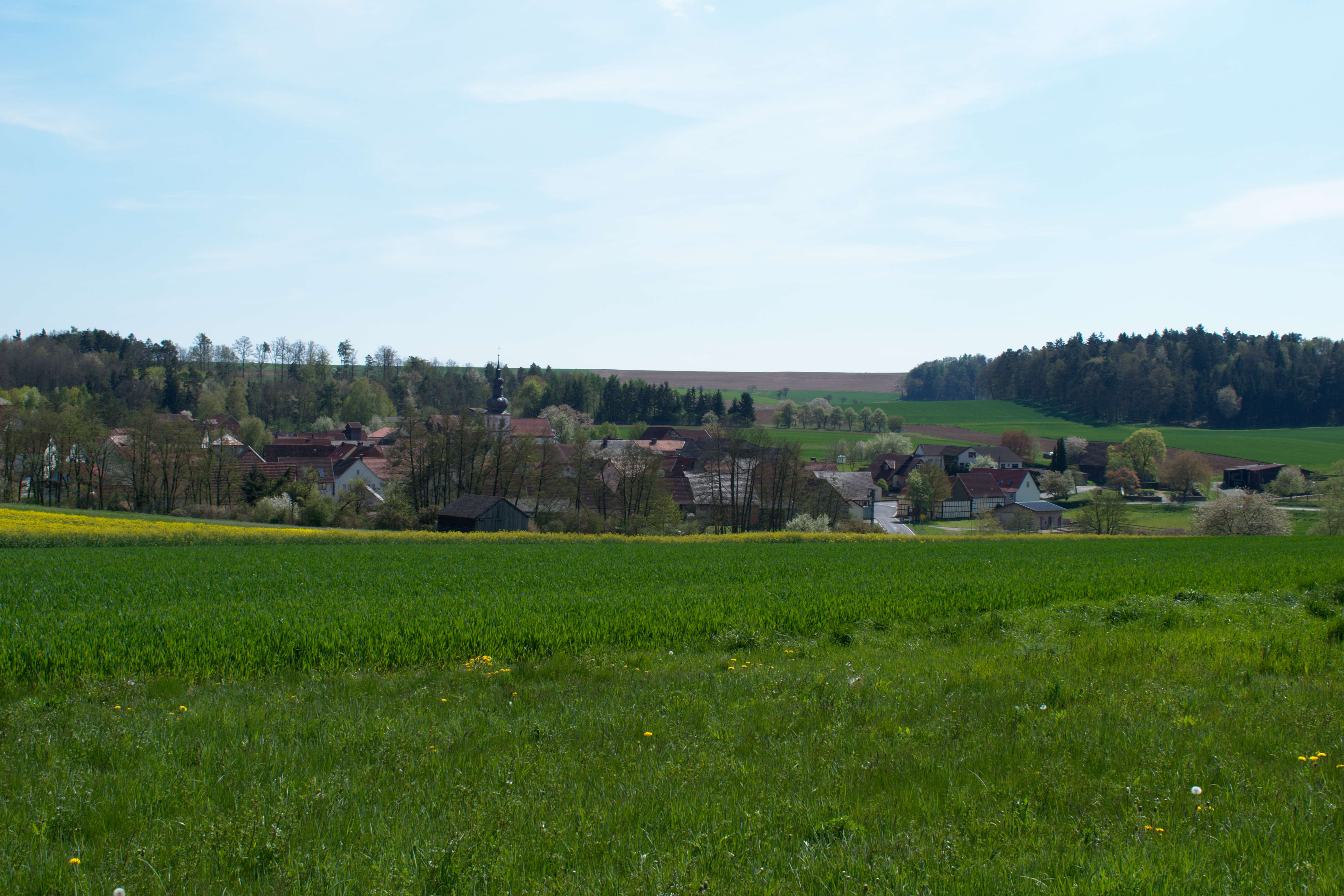 Bahra